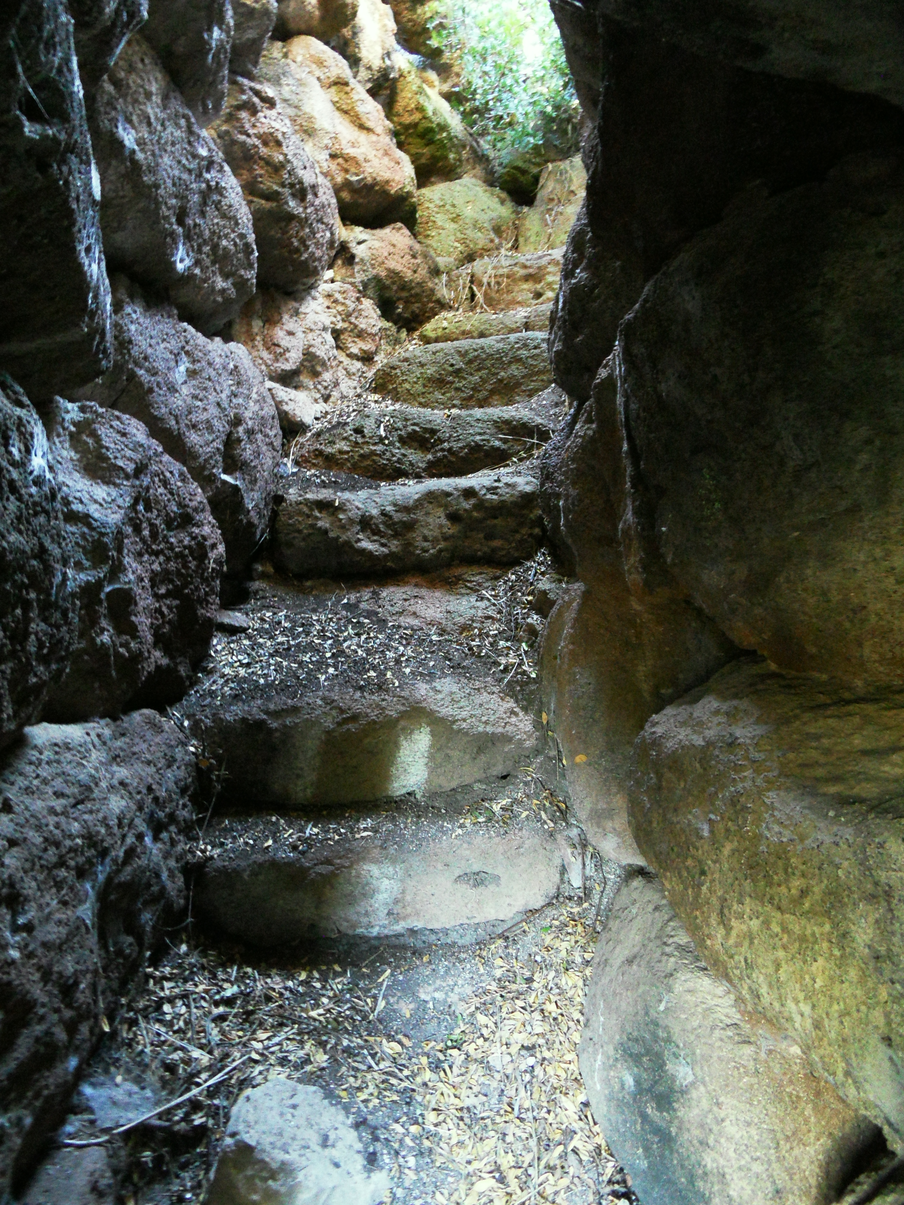 Scala elicoidale del nuraghe Rumanedda, dal basso verso l'alto.